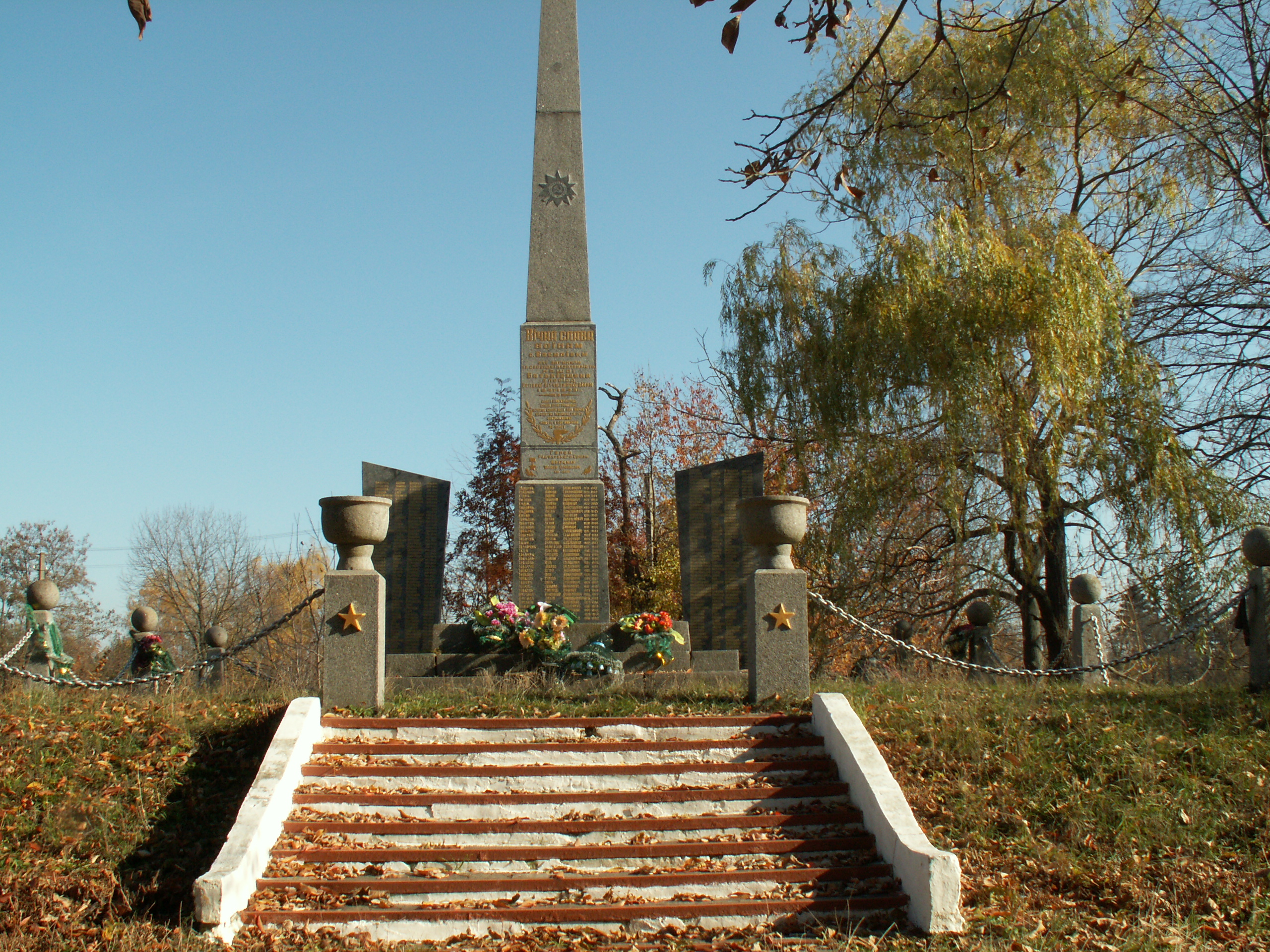 Меморіал загиблим у роки Другої світової війни